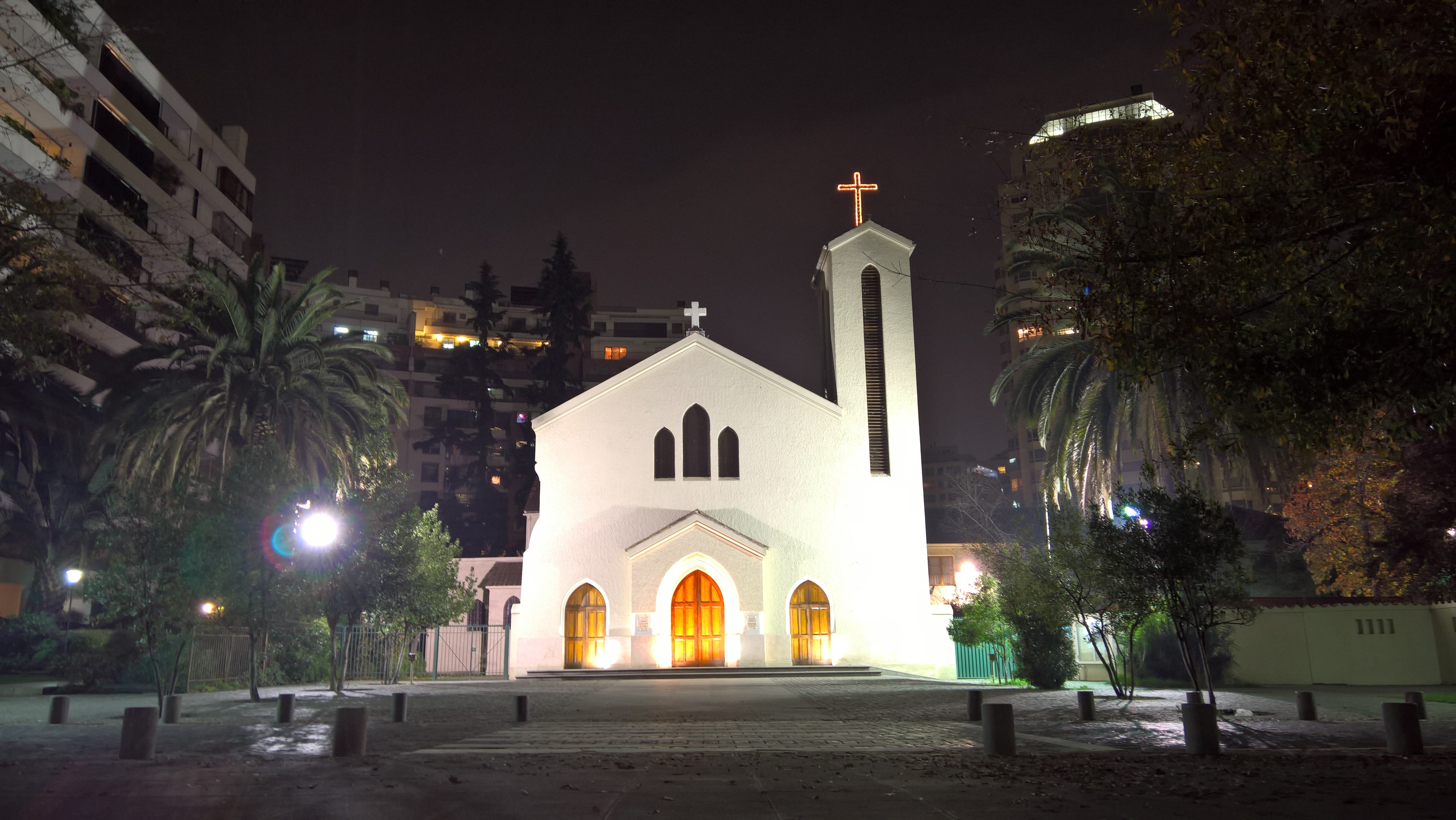 Iglesia de Nuestra Señora de los Ángeles, en el barrio El Golf (Santiago de Chile).